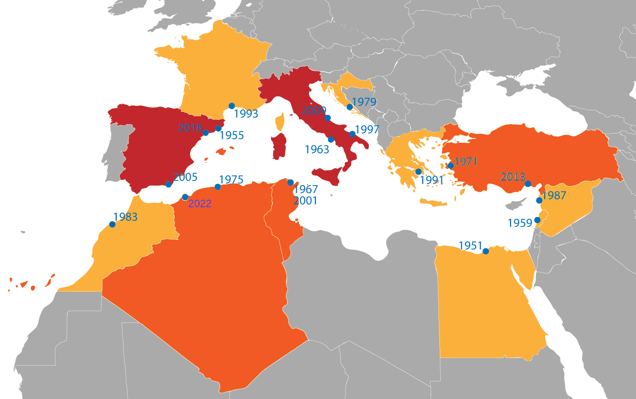 L'immagine riassume il numero di edizioni ospitate dai singoli Paesi, indicando posizione geografica e anno di organizzazione dei Giochi (aggiornata alla XVII edizione del 2013). Si è seguito il seguente codice di colori: Arancione chiaro: 1 edizione; Arancione scuro: 2 edizioni; Rosso: 3 edizioni.